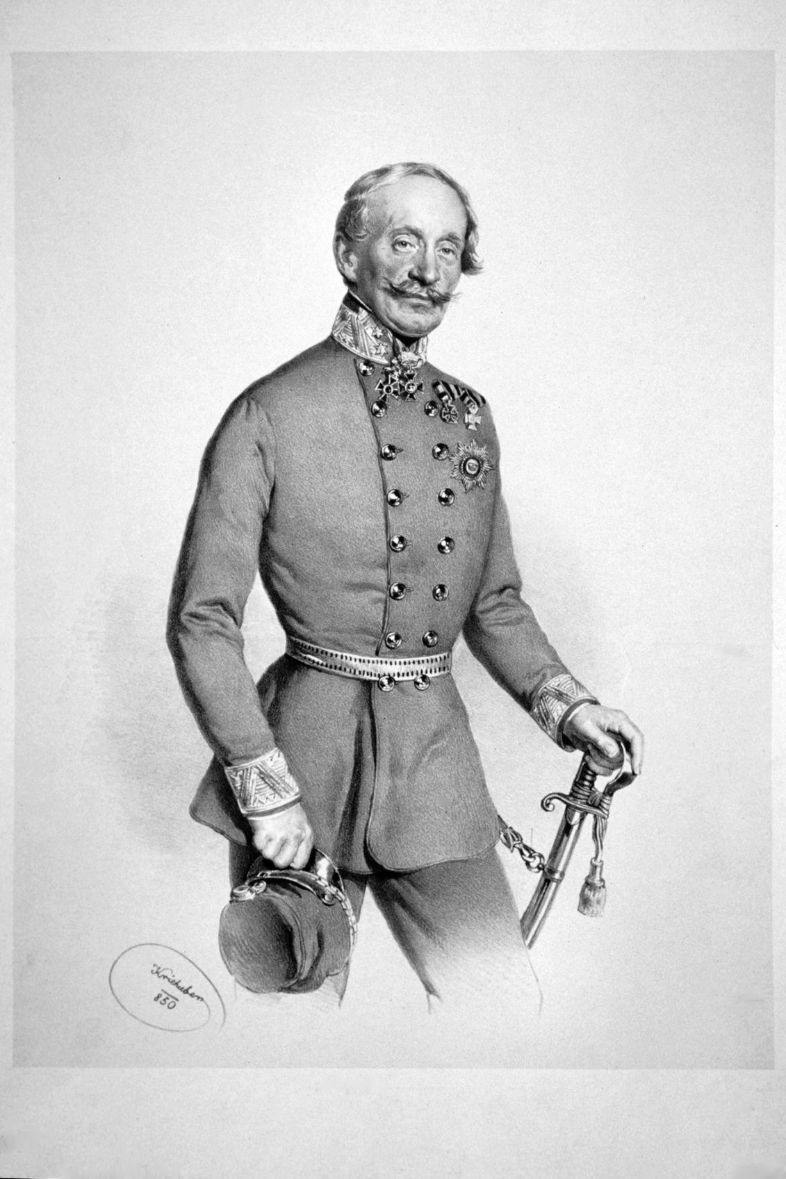 Christian Freiherr von Appel (1785-1854), k. k. Feldmarschalleutnant